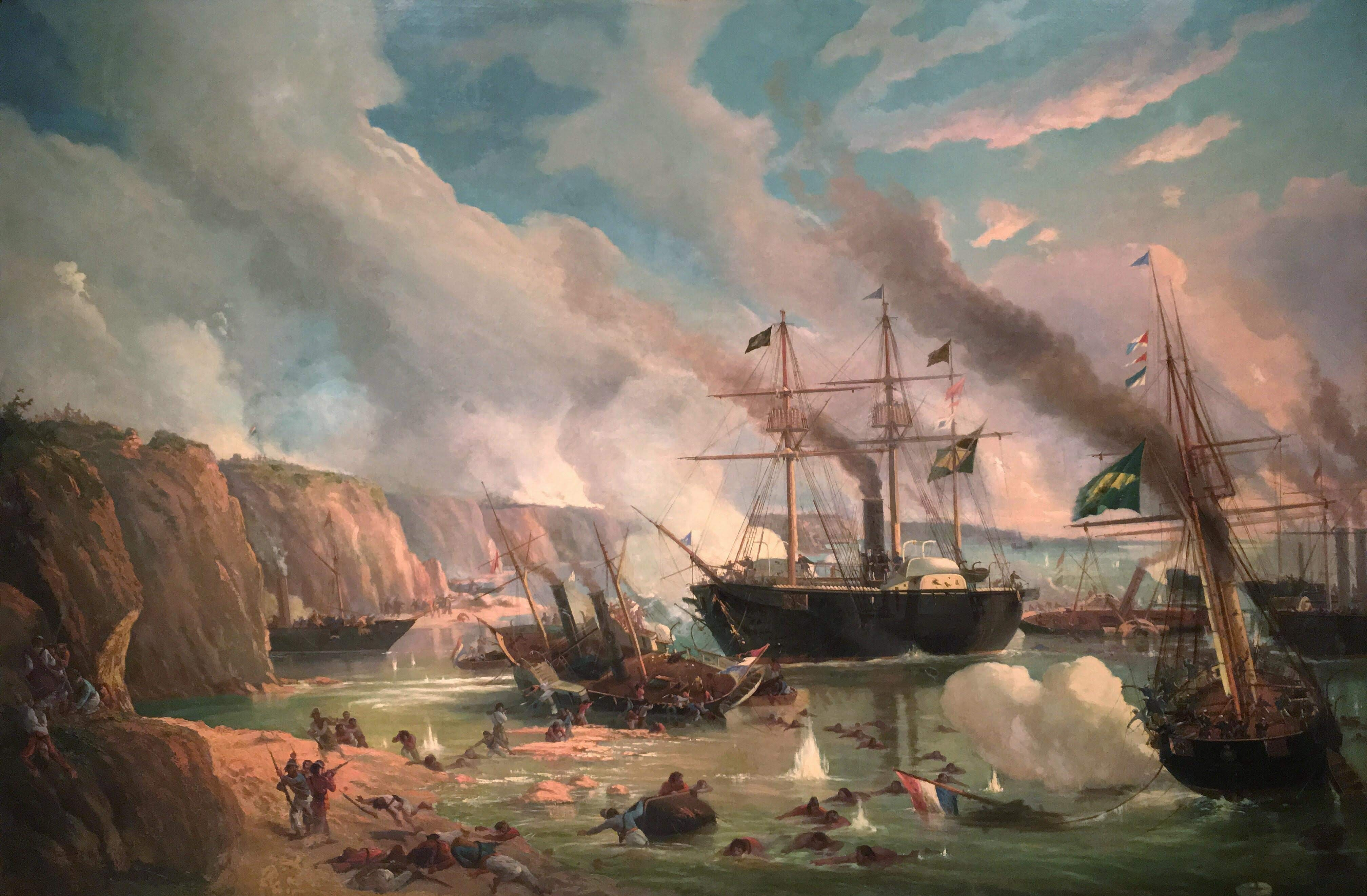 Combate Naval do Riachuelo